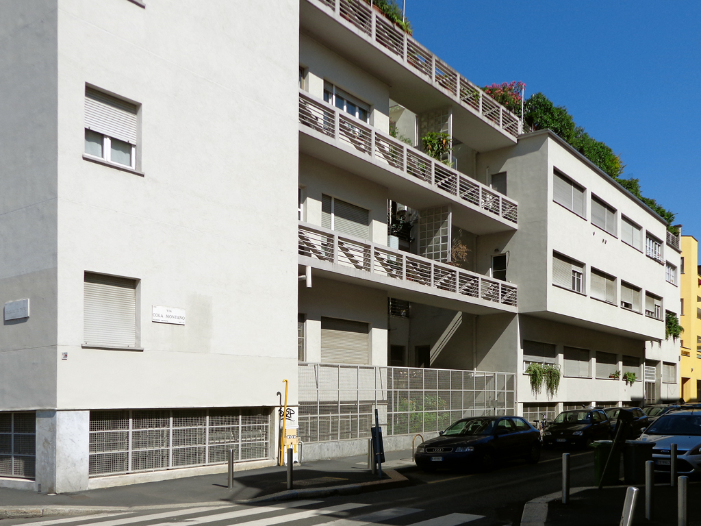 Milano, casa Comolli-Rustici. La facciata laterale lungo via Cola Montano.